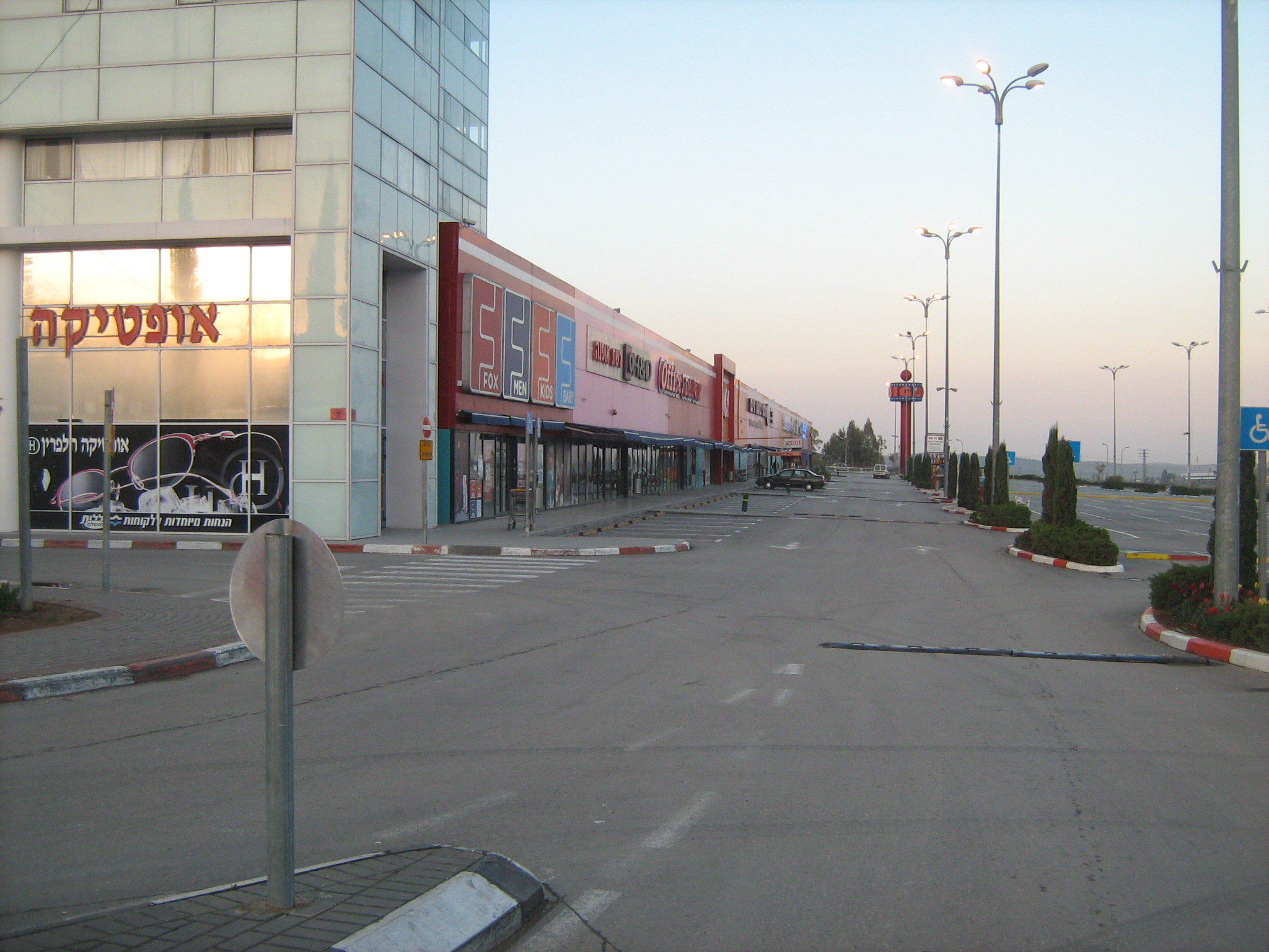 קניון ביג בבית שמש